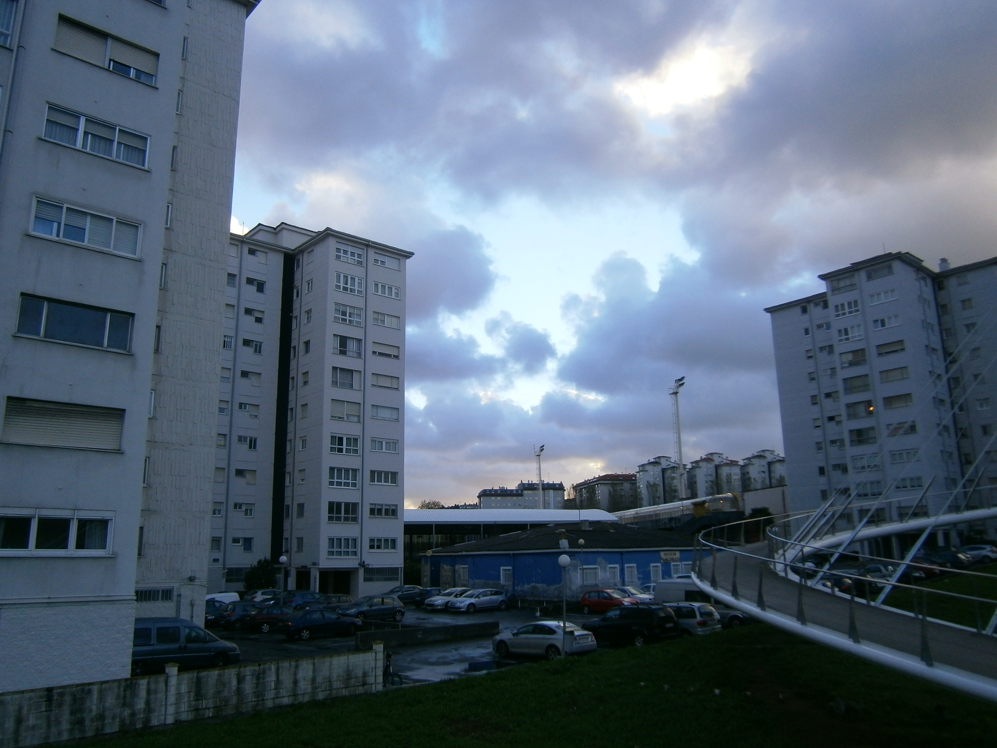 Praza de Laxes de Orro